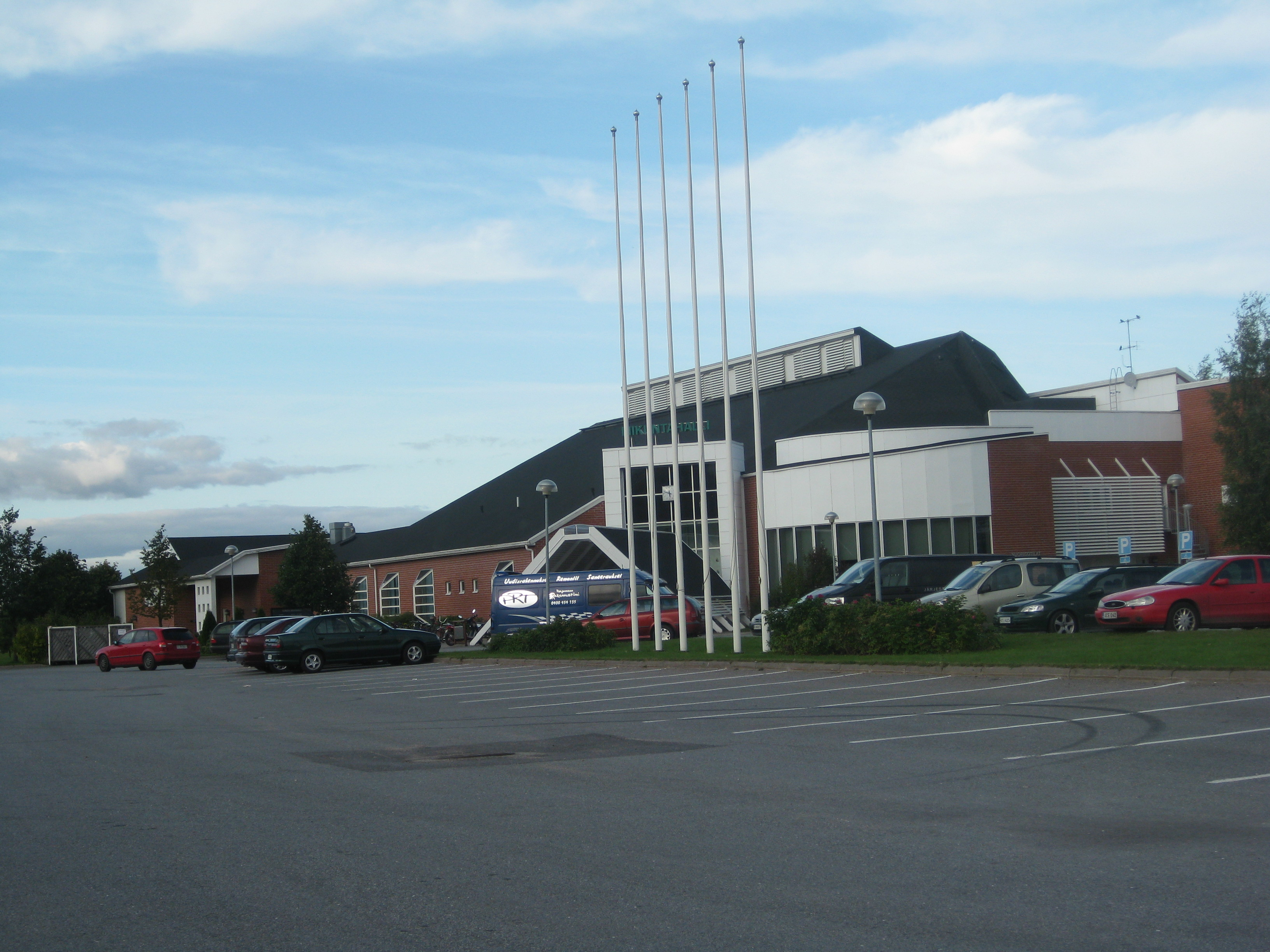 Nurmon liikuntahalli